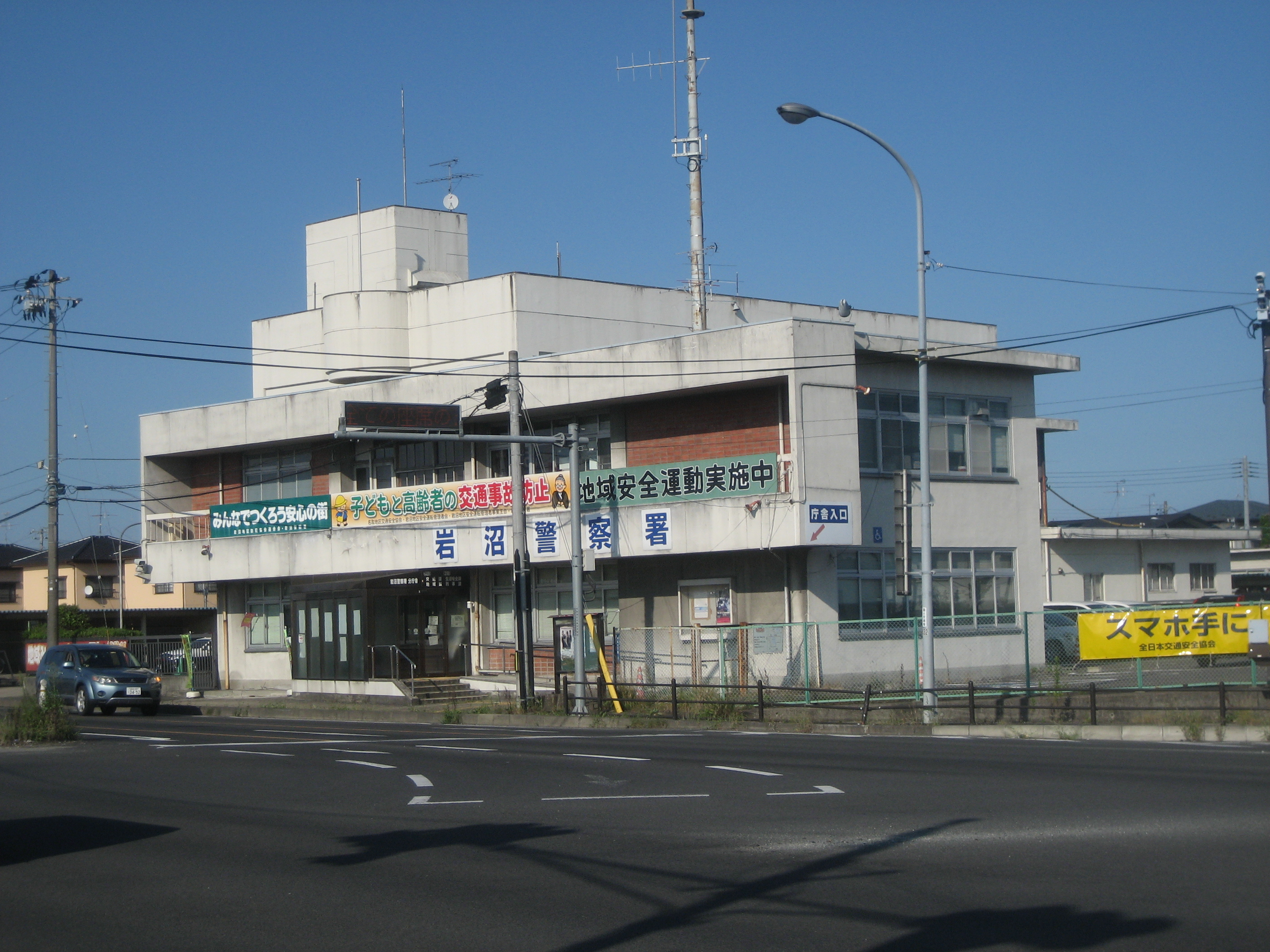 宮城県岩沼警察署庁舎